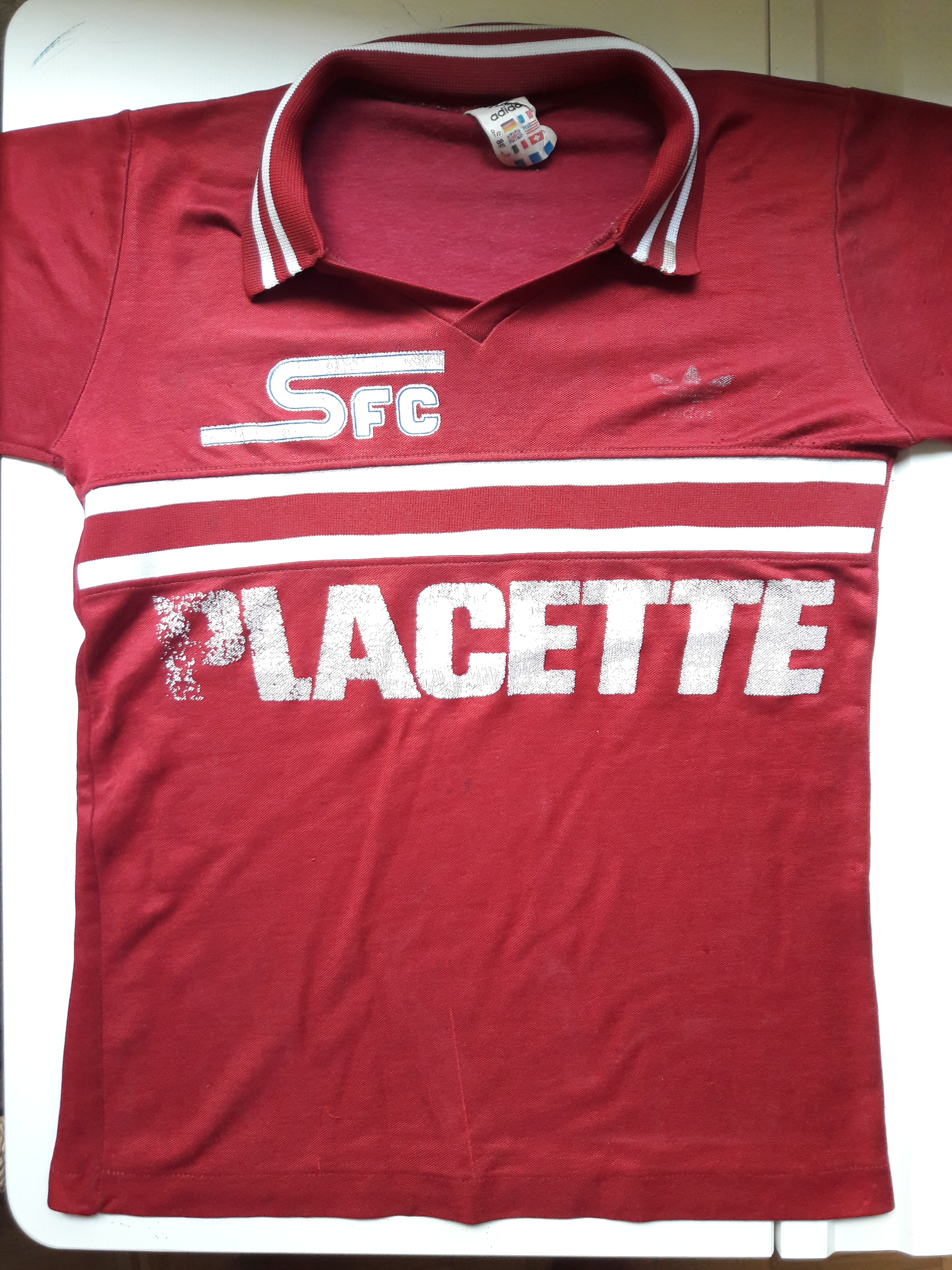 Maillot du Servette FC, début des années 1980